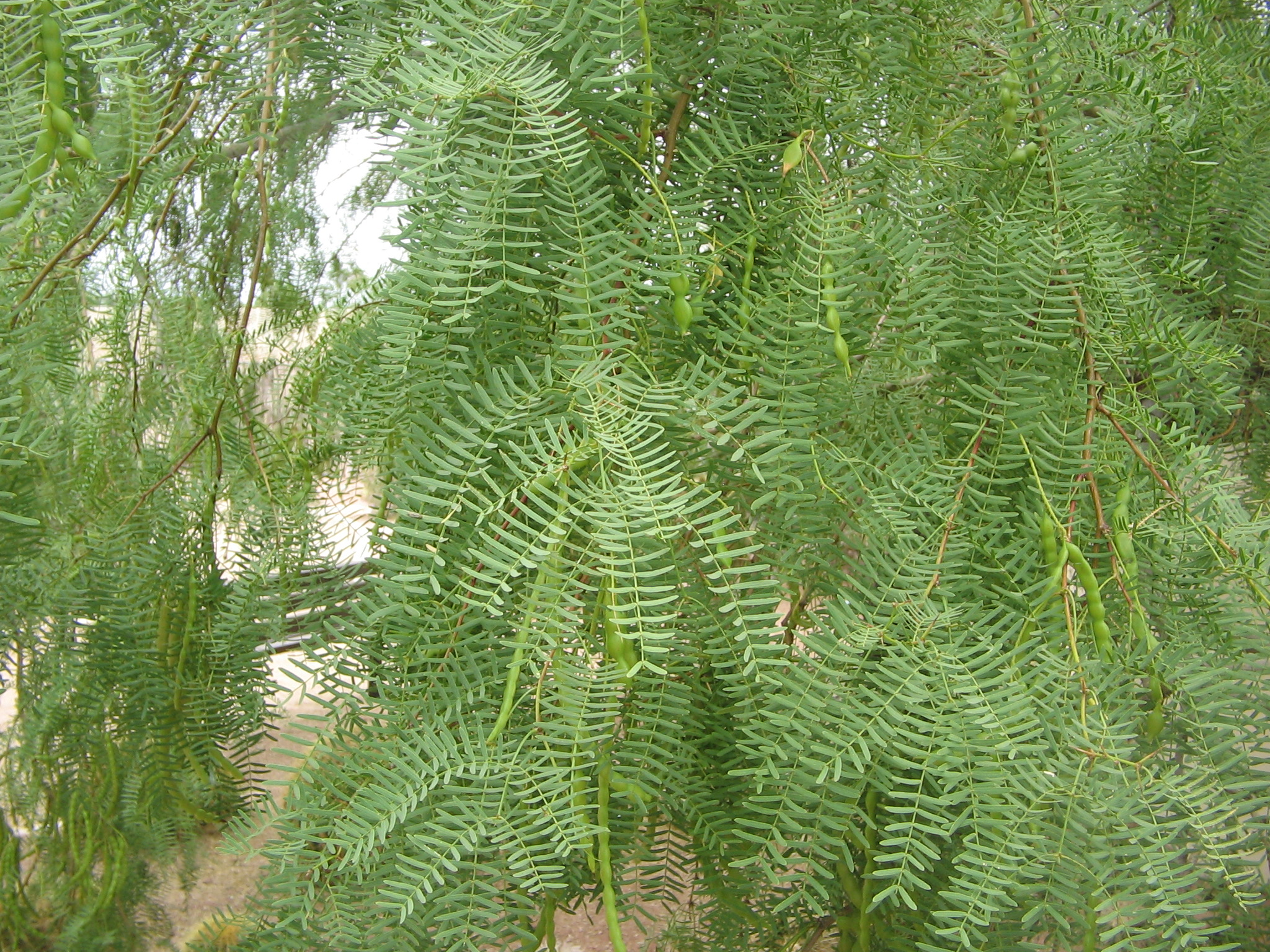 Prosopis glandulosa foliage